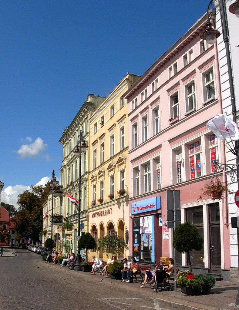 Stary Rynek w Bydgoszczy, pierzeja północna, ul. Farna